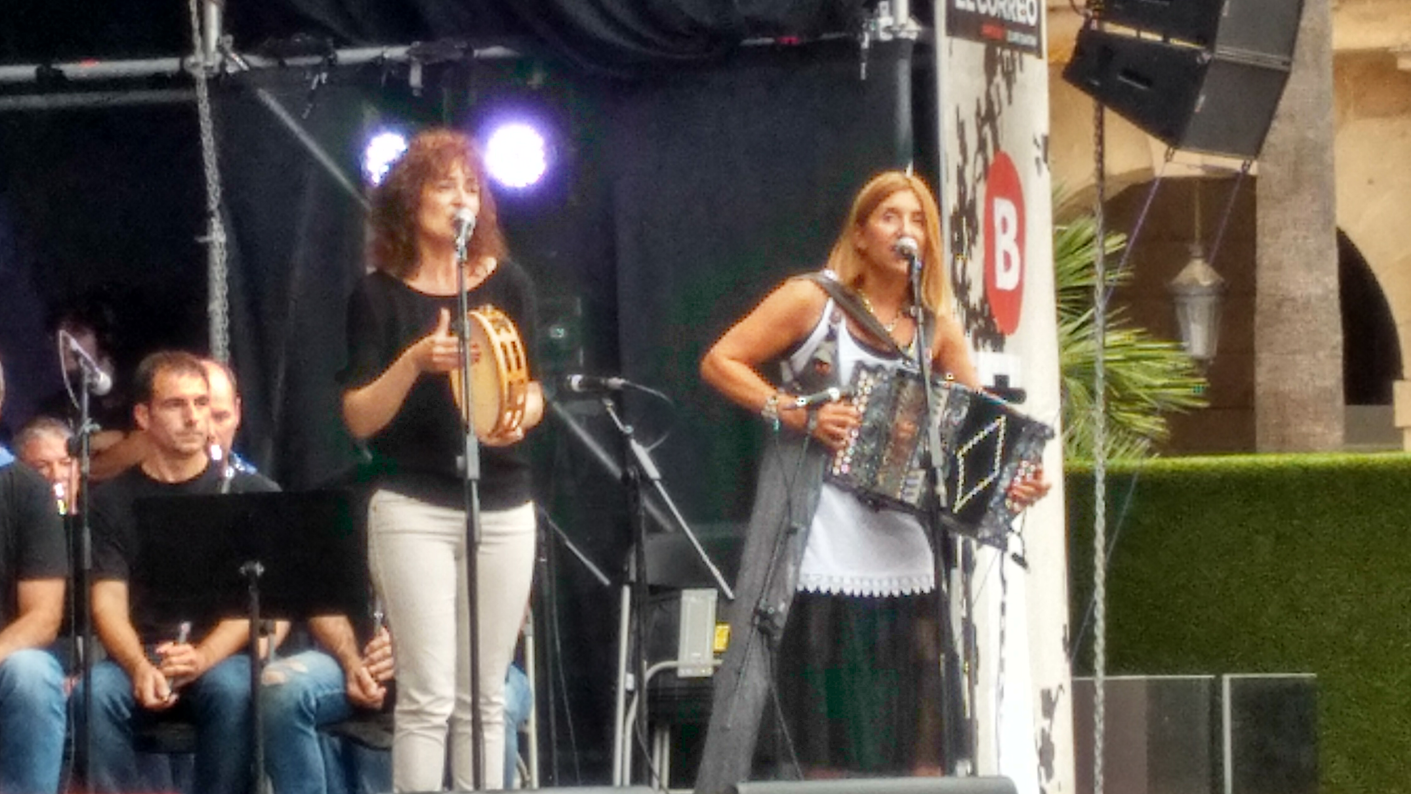 Maixa eta Ixiar musikariak, 2017ko abuztuaren 27an, Bilbon eskainitako kontzertuan.